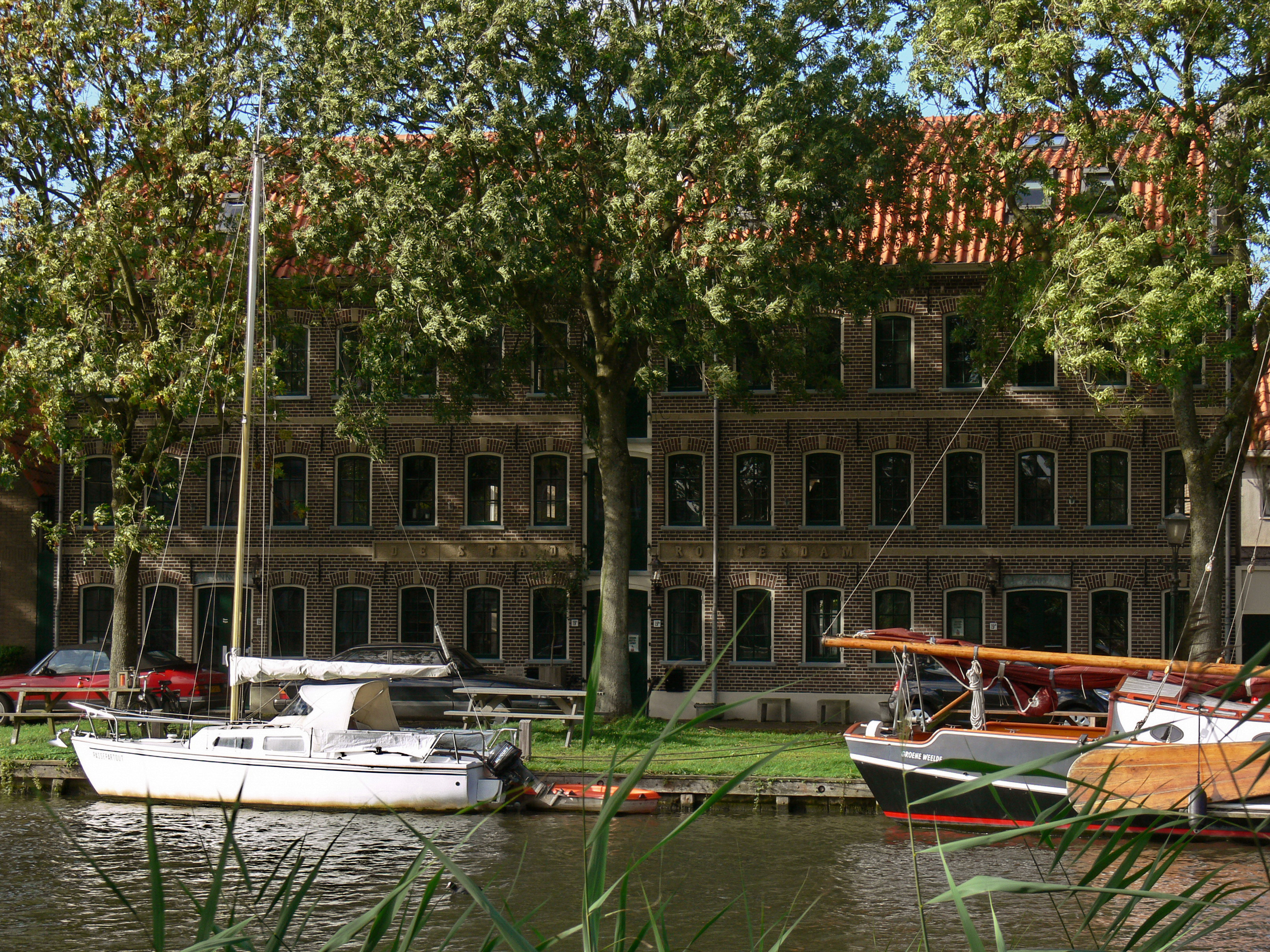 KAASPAKHUIS, genaamd 'DE STAD ROTTERDAM', gebouwd in 1888 in Ambachtelijk traditionalistische trant, gelegen in de rooilijn direkt aan de weg aan de noordzijde van de Nieuwe Haven in het beschermde stadsgezicht van Edam. Het kaaspakhuis is via een tussenlid van een bouwlaag verbonden met het pand Voorhaven 34 (1934). Tussen de eerste en de tweede bouwlaag is ter weerszijden van de hijsluiken de naam van het kaaspakhuis in reliëf ter breedte van zeven traveeen in zandsteen uitgevoerd: 'DE STAD ROTTERDAM'. Links van de deuren op de begane grond is, tussen de eerste twee vensters onder de vensterbanken, een hardstenen plaat aangebracht met de tekst: 'DE EERSTE STEEN GELEGD/DOOR/JAN DE BOER/OUD 2 JAAR EN 8 MAANDEN/3 NOVEMBER 1888'.